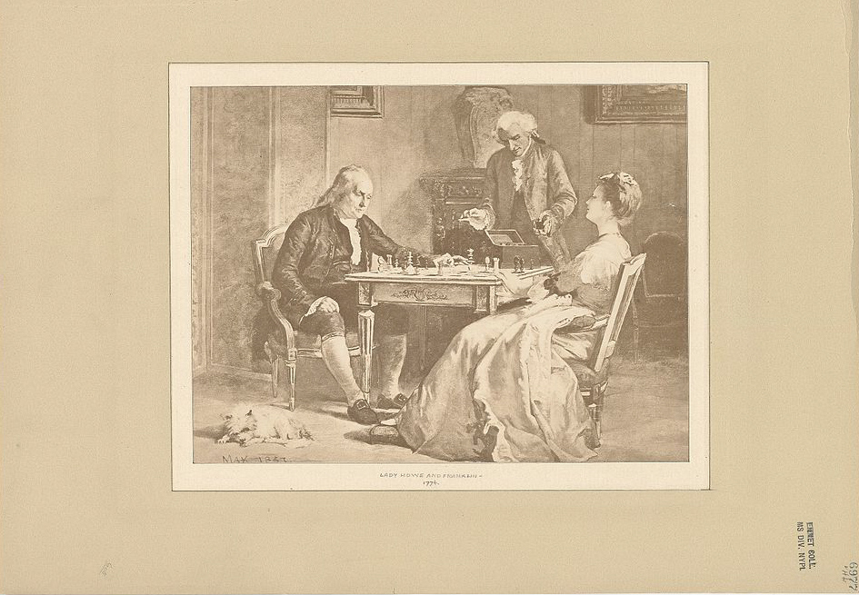 Bild von Lady Howe und Benjamin Franklin, 1774, Ausschnitt der Ursprungsdatei unter Hinweglassung eines mitgescannten Farbstreifens